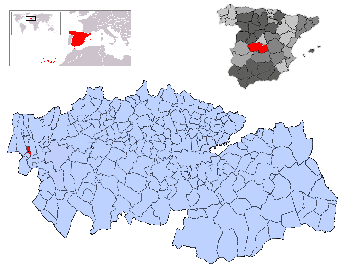 Herreruela de Oropesa en la provincia de Toledo